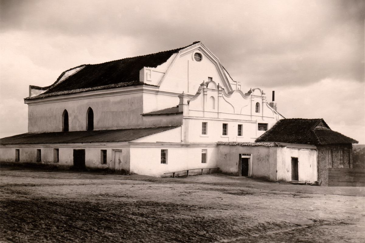 Синагога XVII - XVIII в. в Изяславе (Заславе).